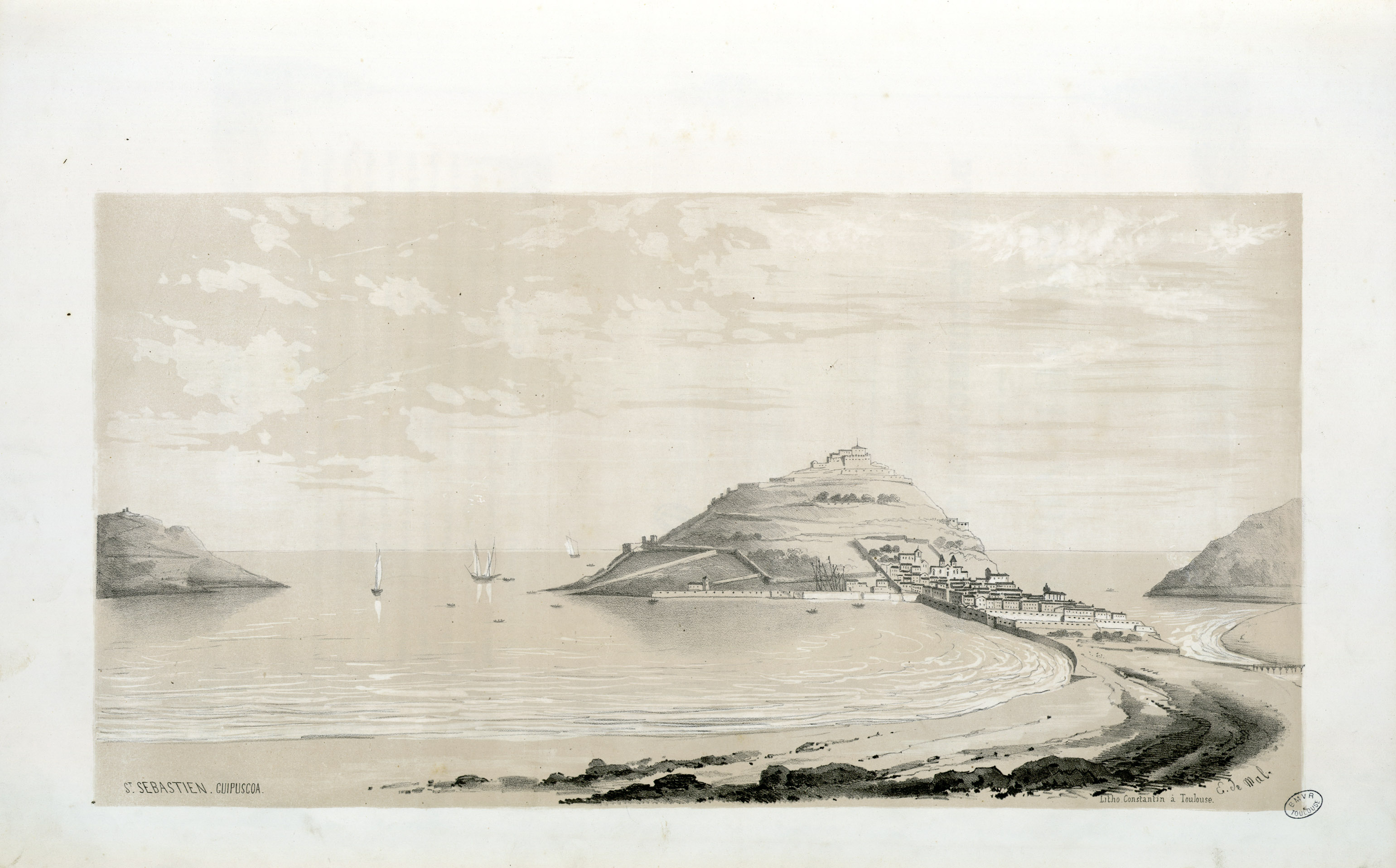 Fait partie d'un recueil de 15 planches lithographiées en camaïeu avec titre lithographié Ancely, René (1876 - 1966). Possesseur